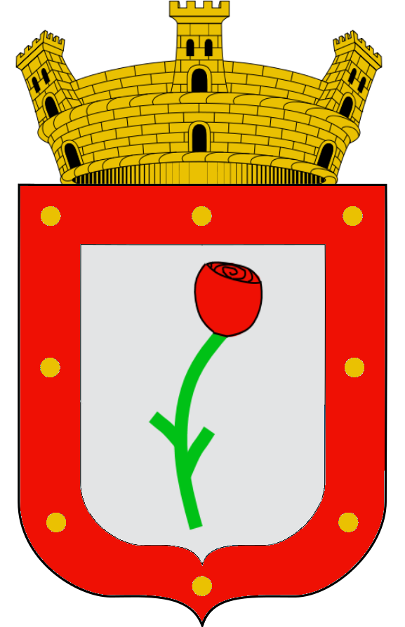 Escudo de Taroda: En campo de plata, rosa en su color, con bordadura de gules y claveteada en oro. Timbrado con Corona Mural.